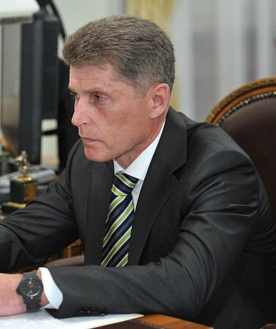 Олег Кожемяко